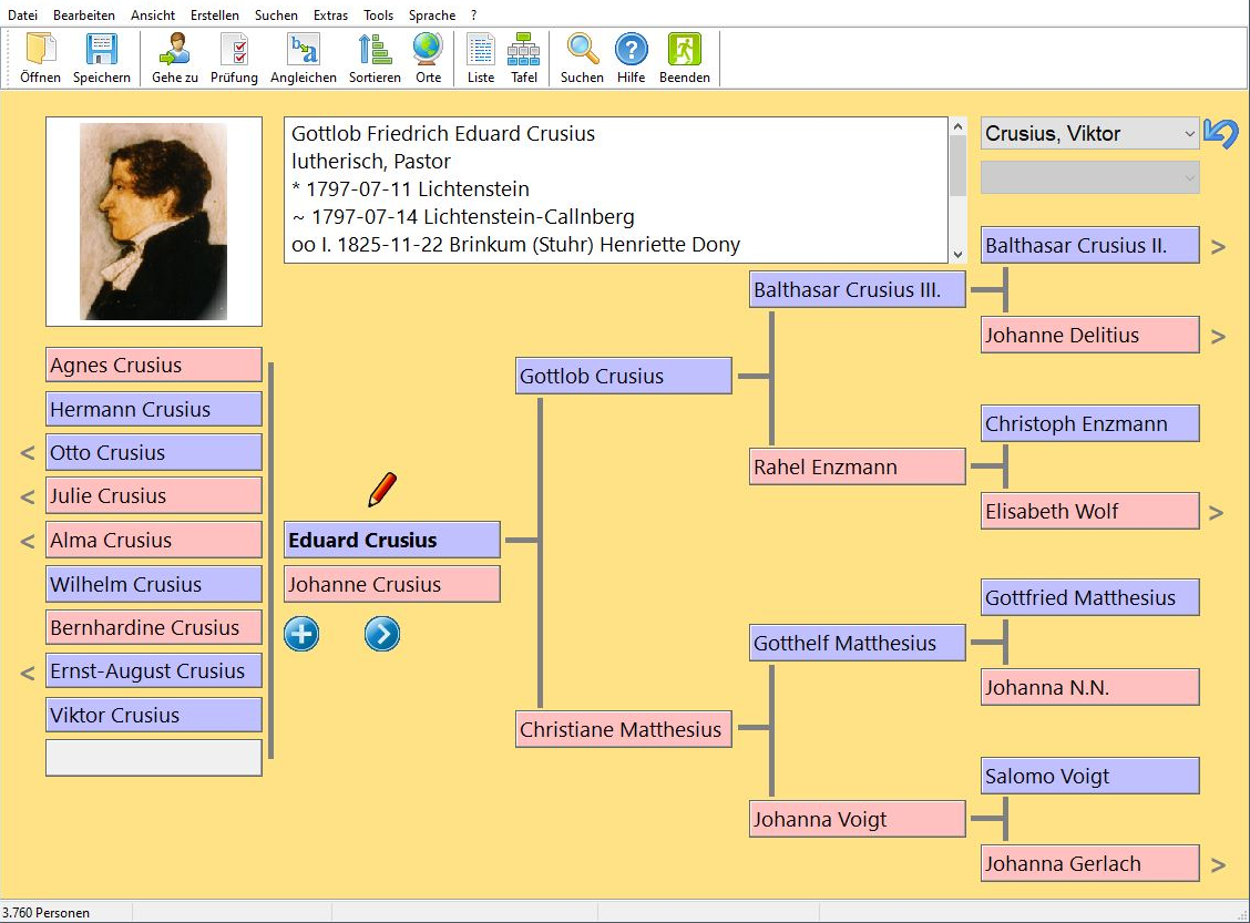 Screenshot der Software "Ahnenblatt" mit den Ahnen von Eduard Crusius